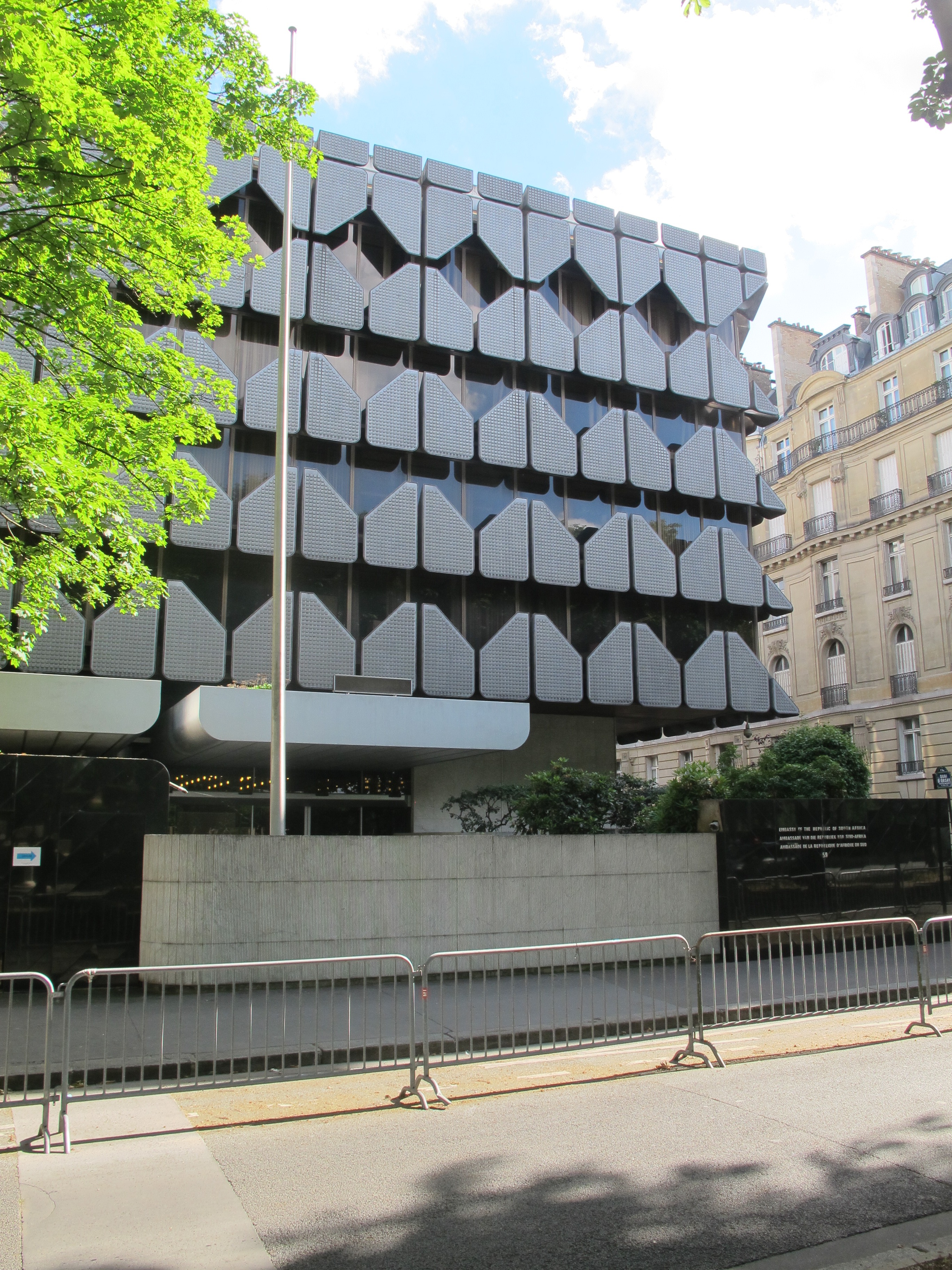 Ambassade d'Afrique du Sud en France, 59 quai d'Orsay (Paris, 7e).